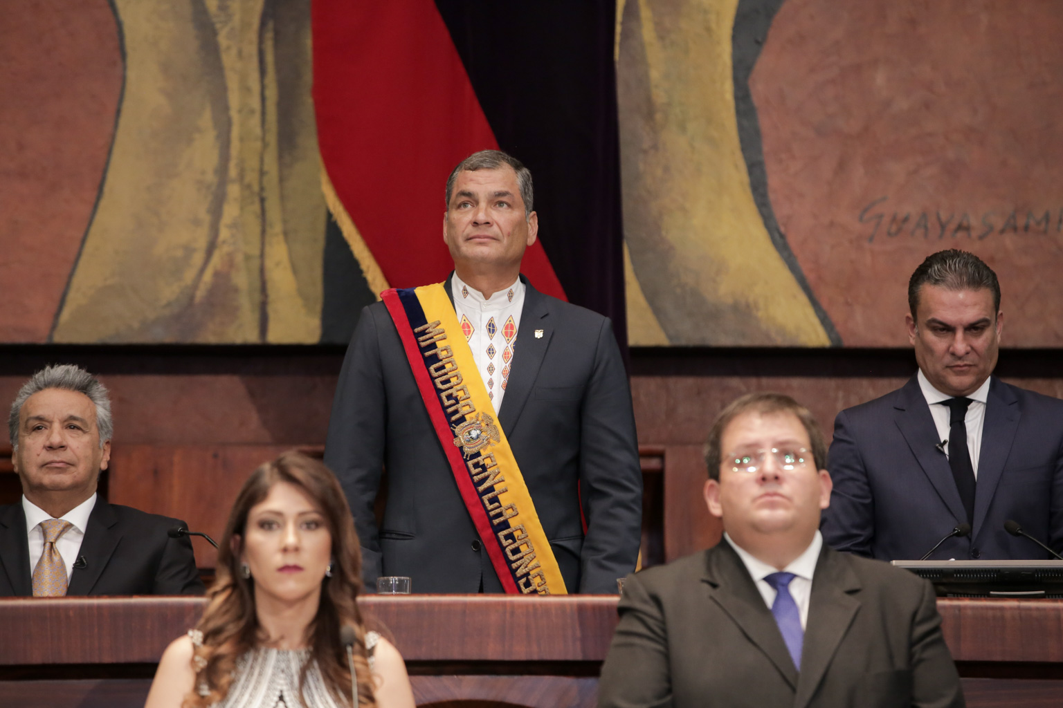 Tema: Transmisión del Mando Presidencial Ecuador 2017. Fotografía: Alberto Romo/Asamblea Nacional